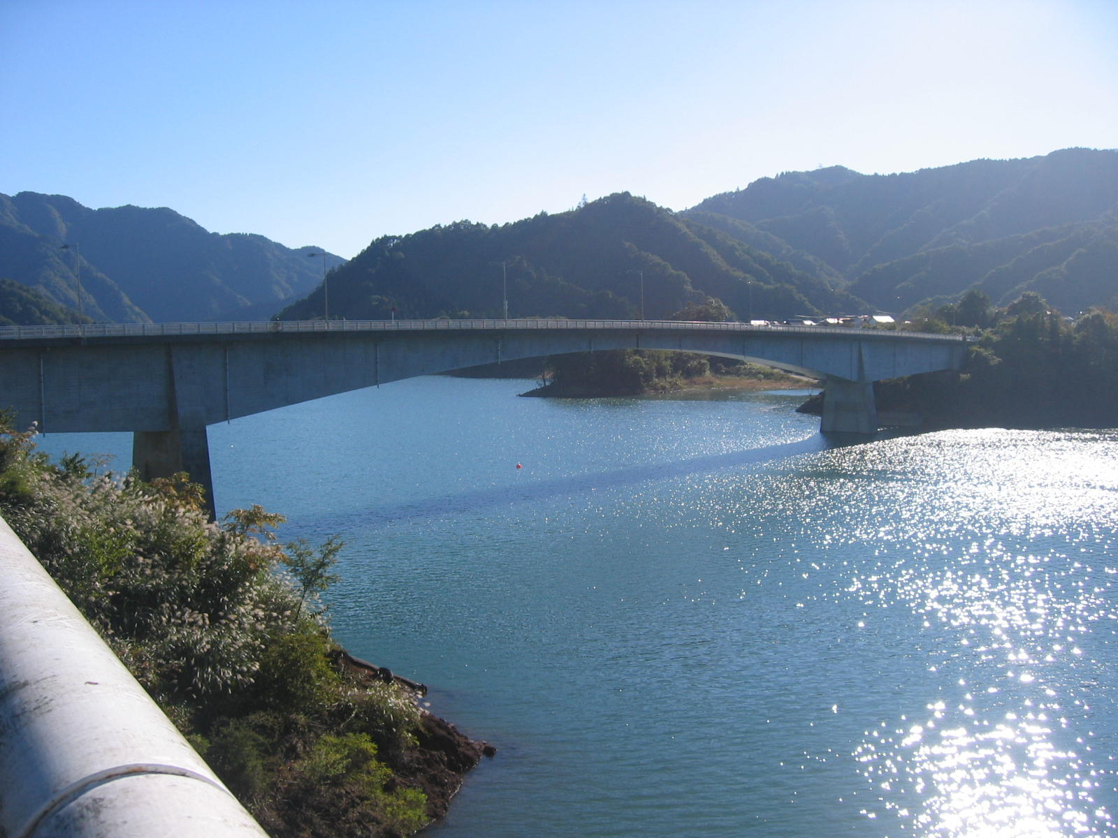 やまびこ大橋